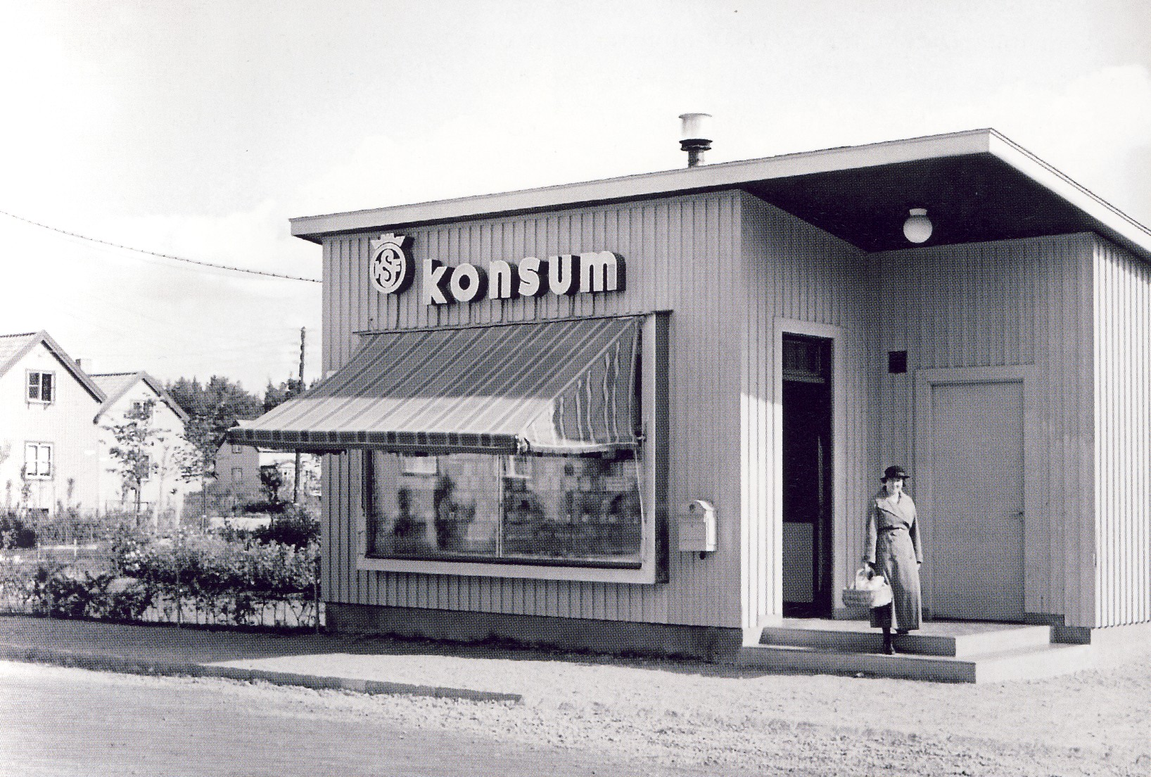 Konsum-butik i Svedmyra i Stockholm